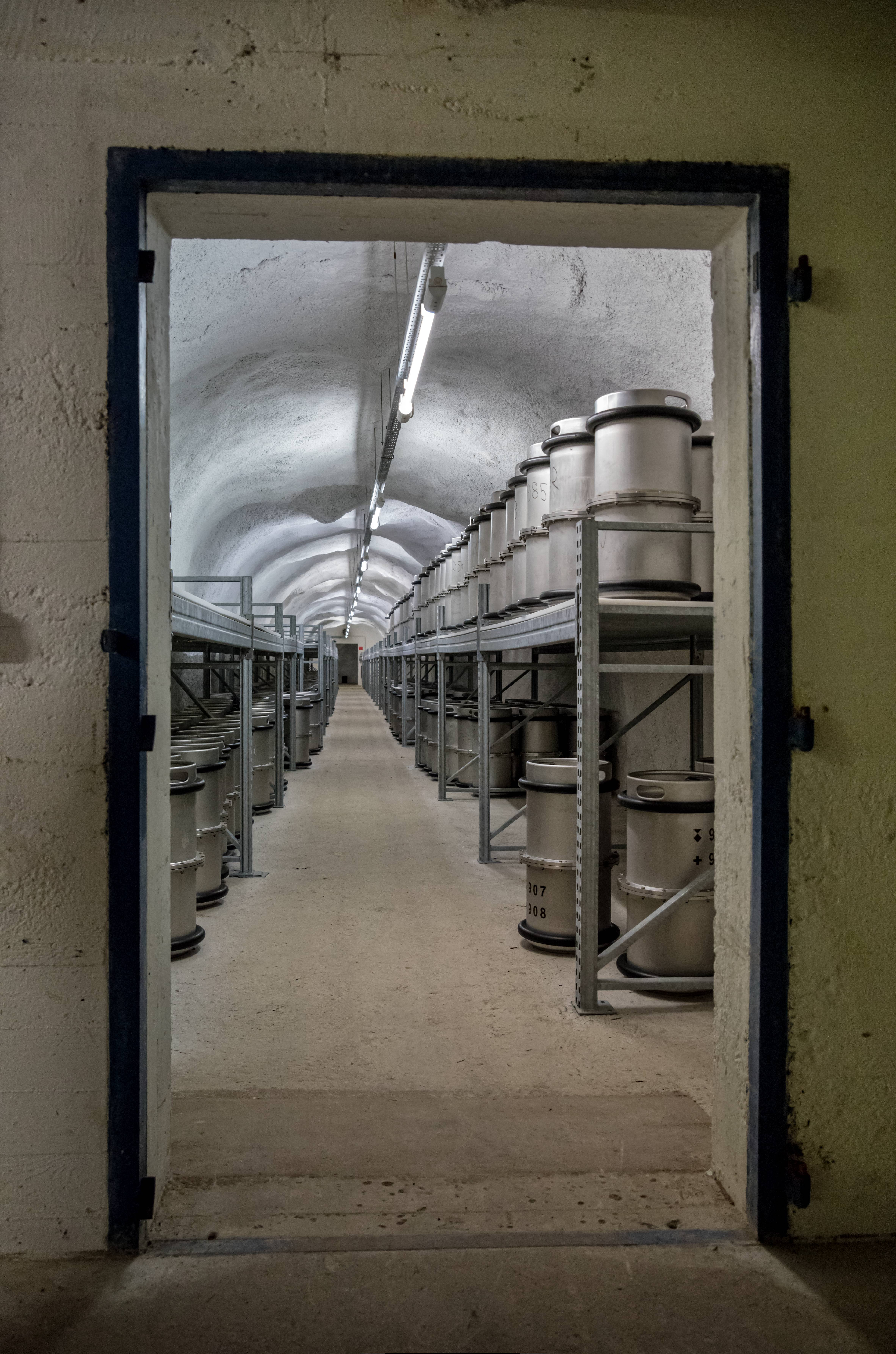 Der Barbarastollen ist der Zentrale Bergungsort der Bundesrepublik Deutschland zur Lagerung von fotografisch archivierten Dokumenten mit hoher national- oder kulturhistorischer Bedeutung. Er ist in Europa das größte Archiv zur Langzeitarchivierung. Die Bilder sind im Rahmen einer Führung des Bundesamts für Bevölkerungsschutz und Katastrophenhilfe (BBK) entstanden - Wikipedia Stammtisch,das 113. Treffen am 30. Mai 2016 Lagerraum B in dem noch Platz ist für etliche Einlagerungen